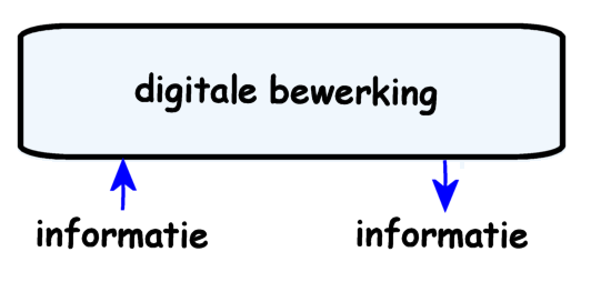 systeem voor geluidsbewerking